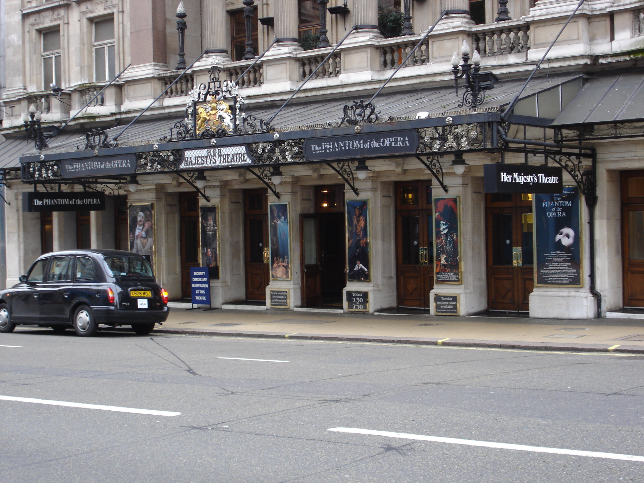 Gros plan sur l'entrée du Her_Majesty's_Theatre qui donne The Phantom of the Opera depuis 1986 Photo personnelle prise le 06/12/2005